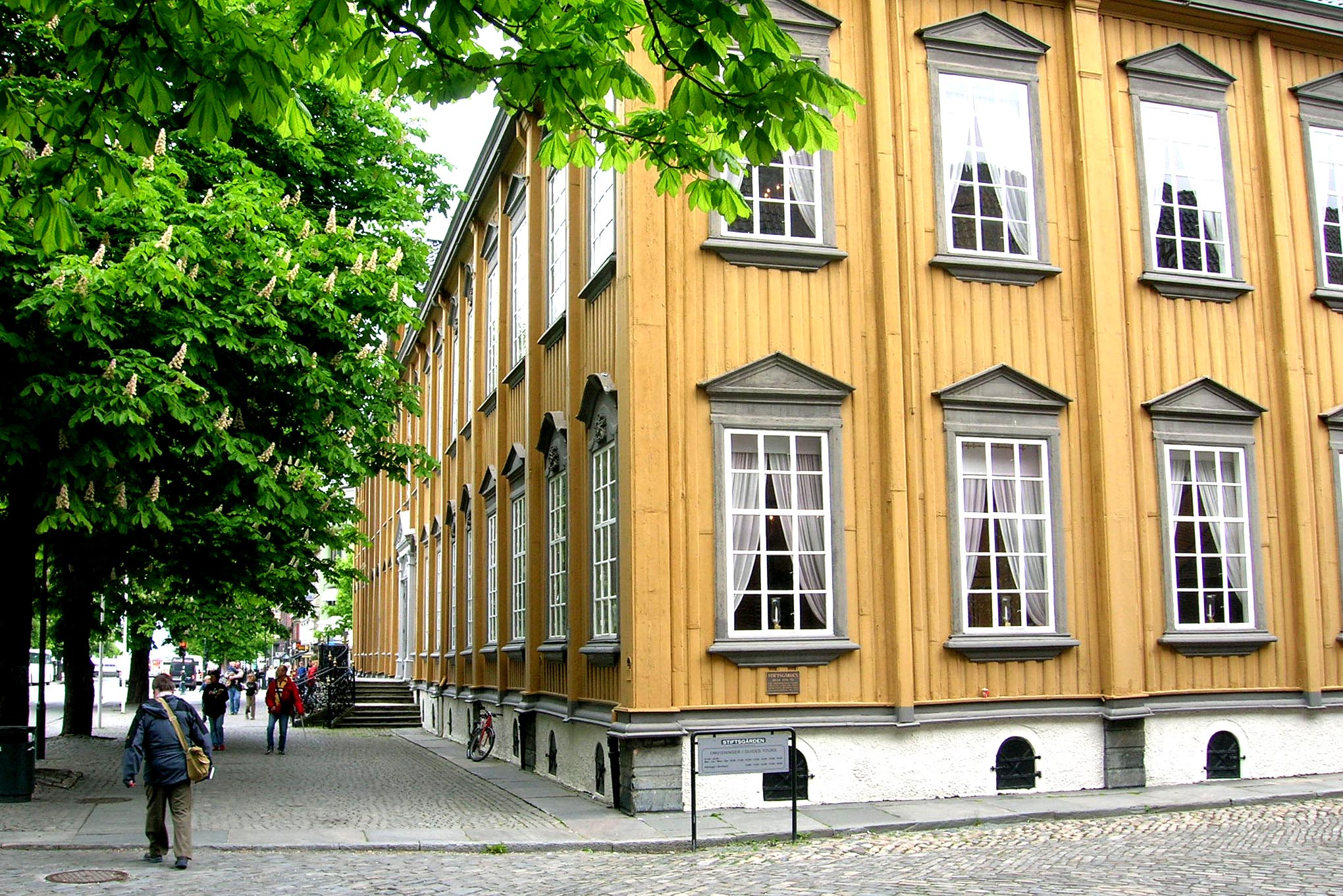 D'kinniklech Residenz vun Trondheim (2006)